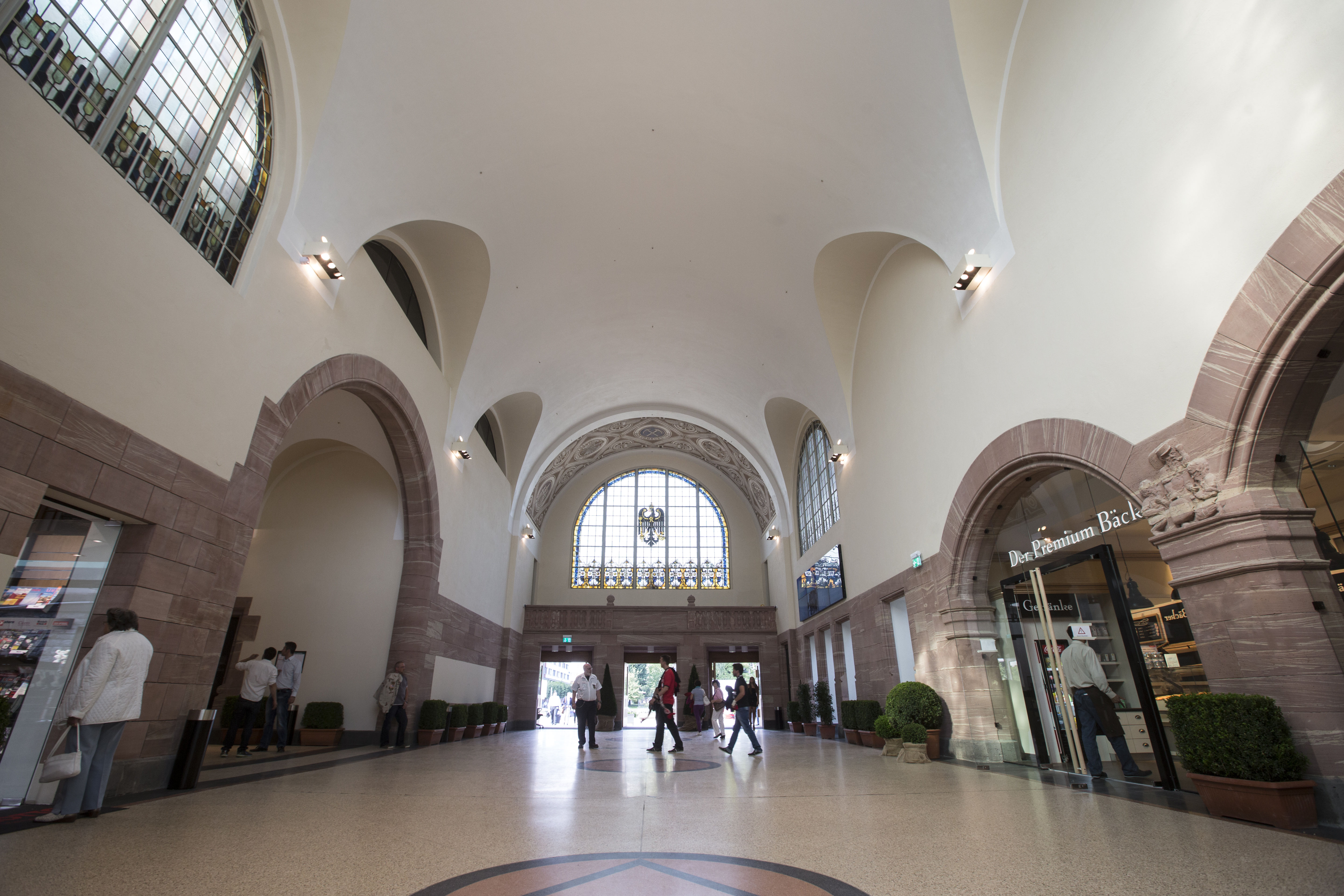 Die restaurierte Haupthalle im restaurierten Bahnhof Bad Homburg. Nach einem Feuer in 2009 wurde das denkmalgeschützte Gebäude Stück für Stück instand gesetzt.